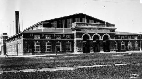 Le « Petit colisée », Québec, en 1931, l'année de sa construction. Il était la propriété de la Commission de l’exposition provinciale. Il fut détruit par un incendie le 15 mars 1949. Il se trouvait sur le site actuel du pavillon de la Jeunesse (ExpoCité).